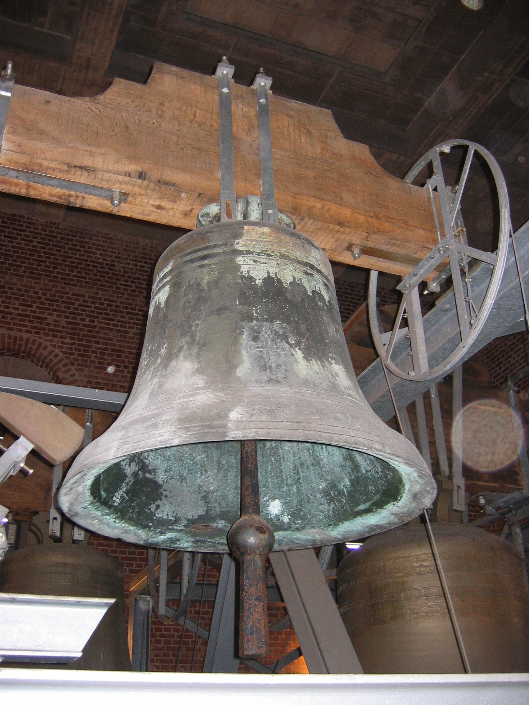 Köln, St. Kunibert, Klemensglocke von 1773.